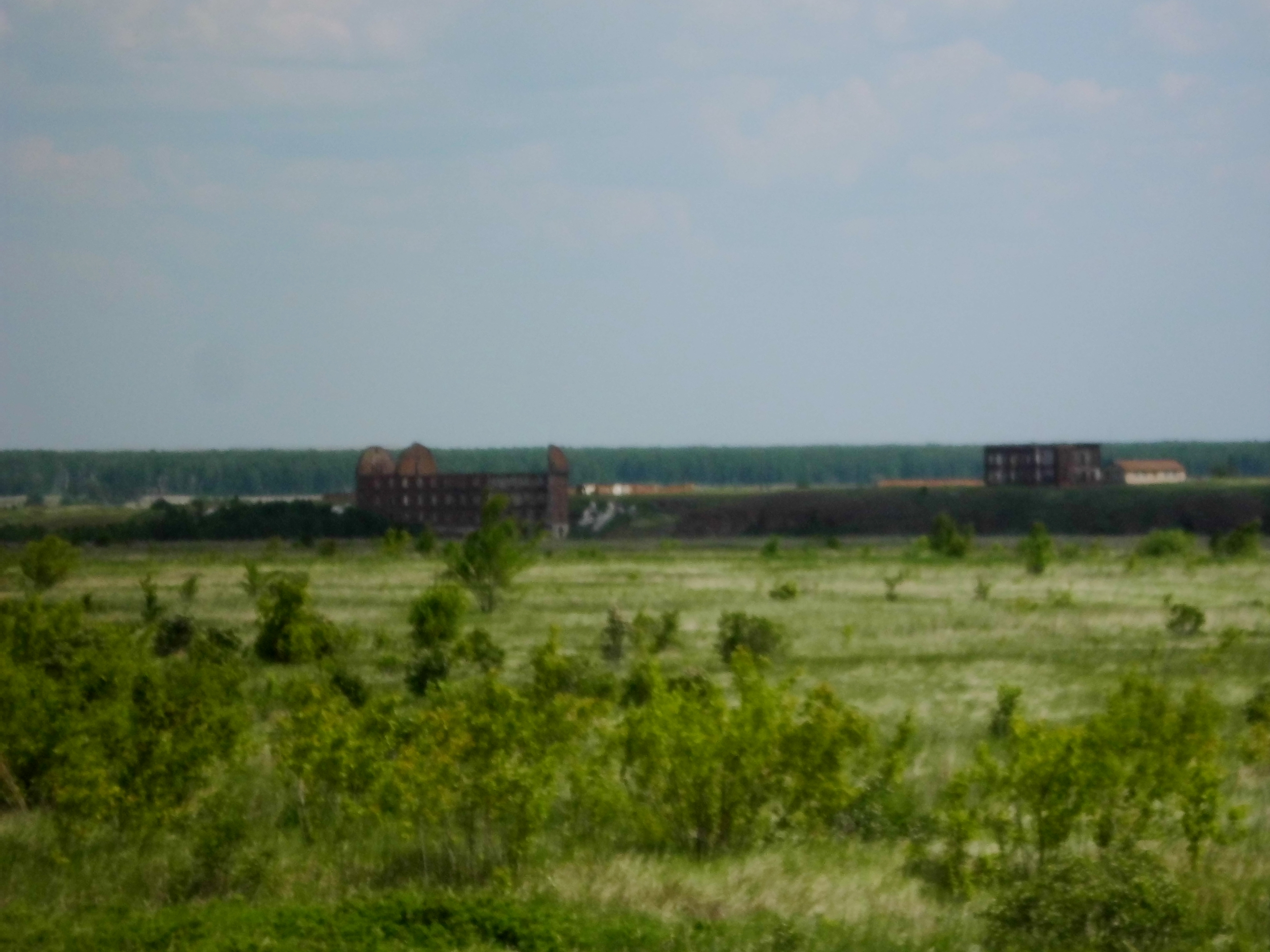 Бывшее село Муслюмово (Кунашакский район). Сооружения на правом берегу реки Теча, вид с левого берега, от железнодорожной линии в восточном направлении. Развалины мельницы Злоказовых (справа), развалины правее развалины 2-этажного дома.